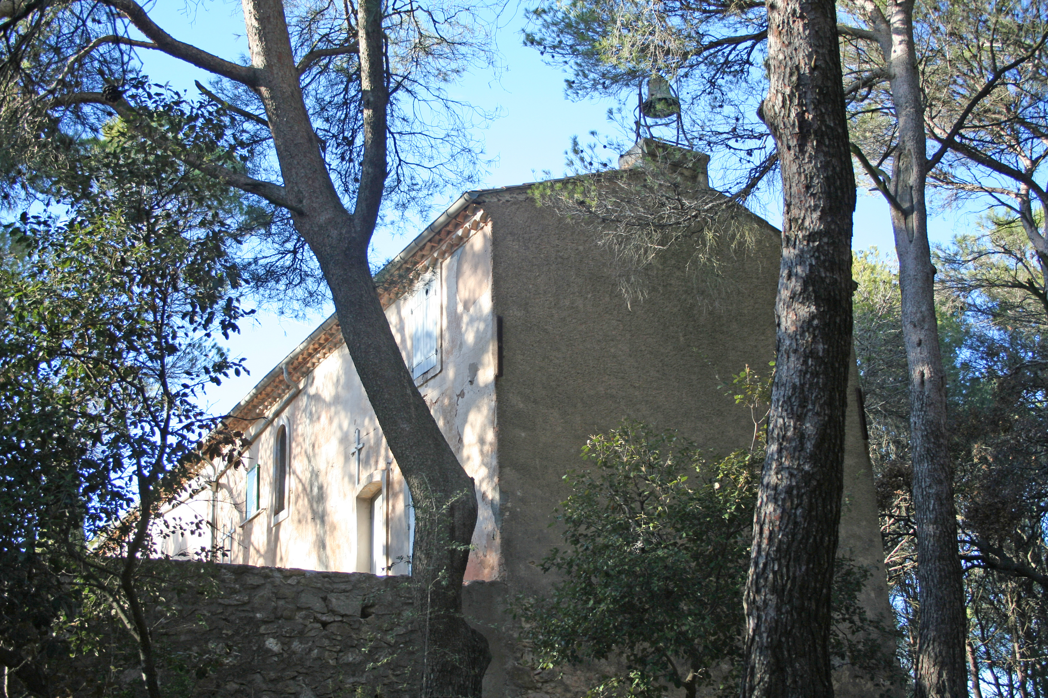 Puisserguier (Hérault) - chapelle Saint-Christophe.